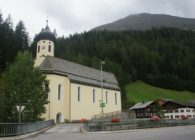 Kath. Pfarrkirche hl. Oswald, Kriegergedächtniskapelle